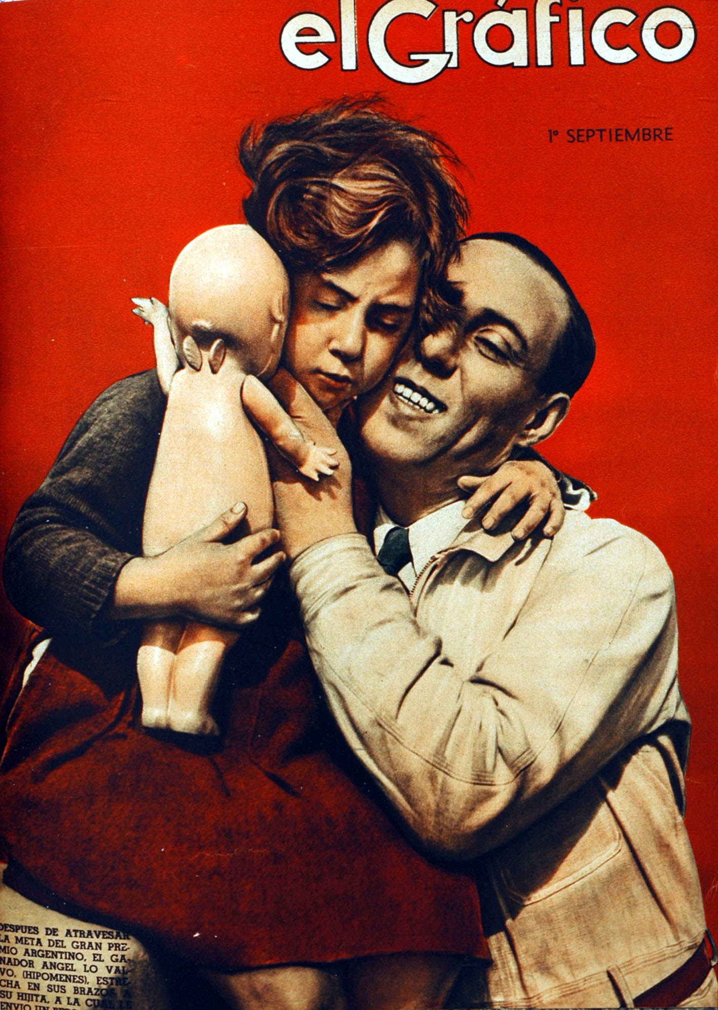 El Grafico del 01 de Septiembre de 1937. Edicion 947